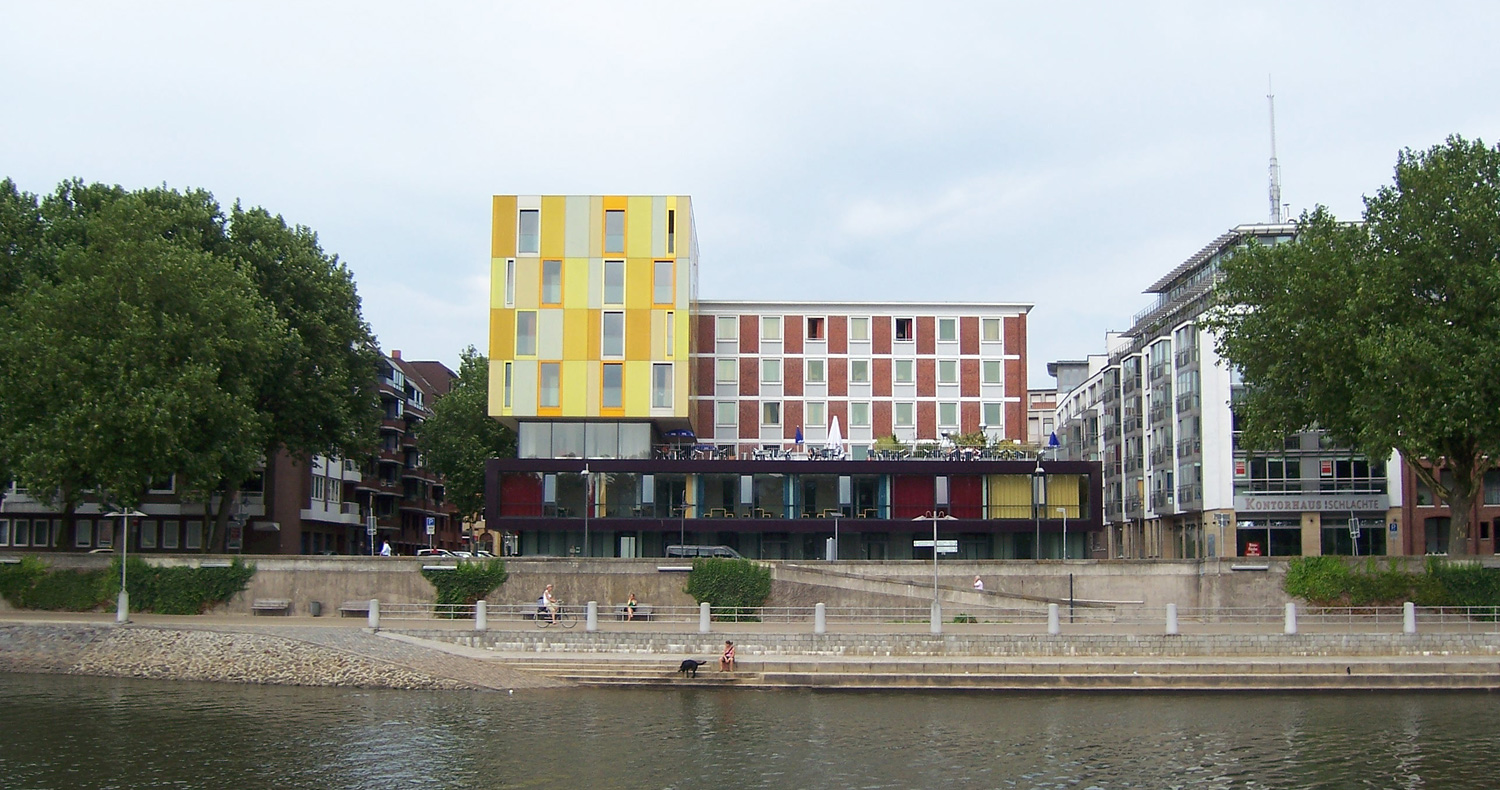 Jugendherberge Bremen, Kalkstr. 6/Ecke Schlachte